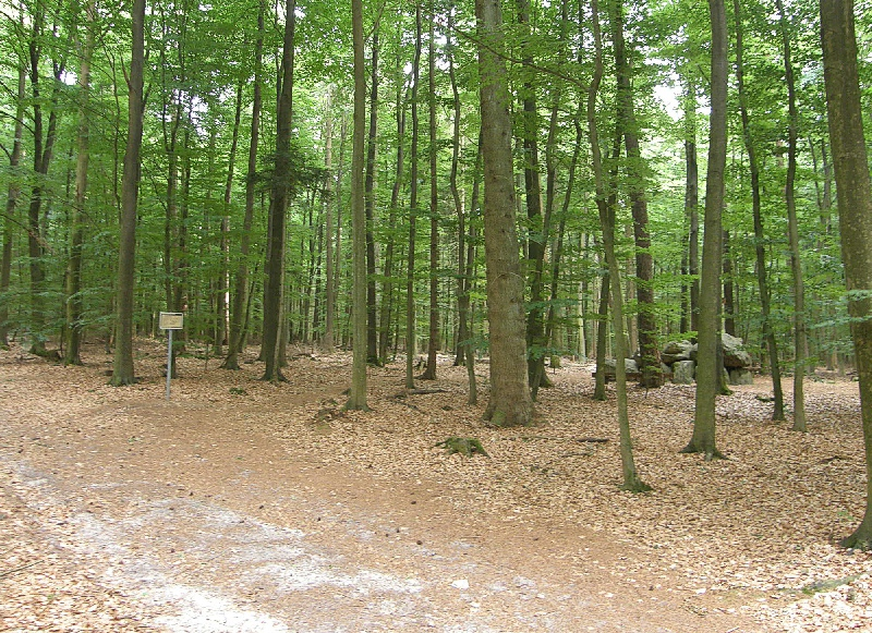 Bilder aus Lamstedt